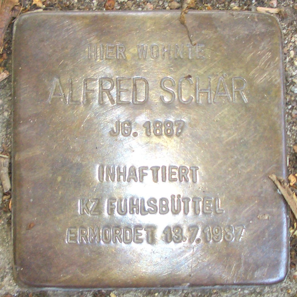 Stolperstein für Alfred Schär vor dem Gebäude Wulfsdorfer Weg 79 in Hamburg-Volksdorf.